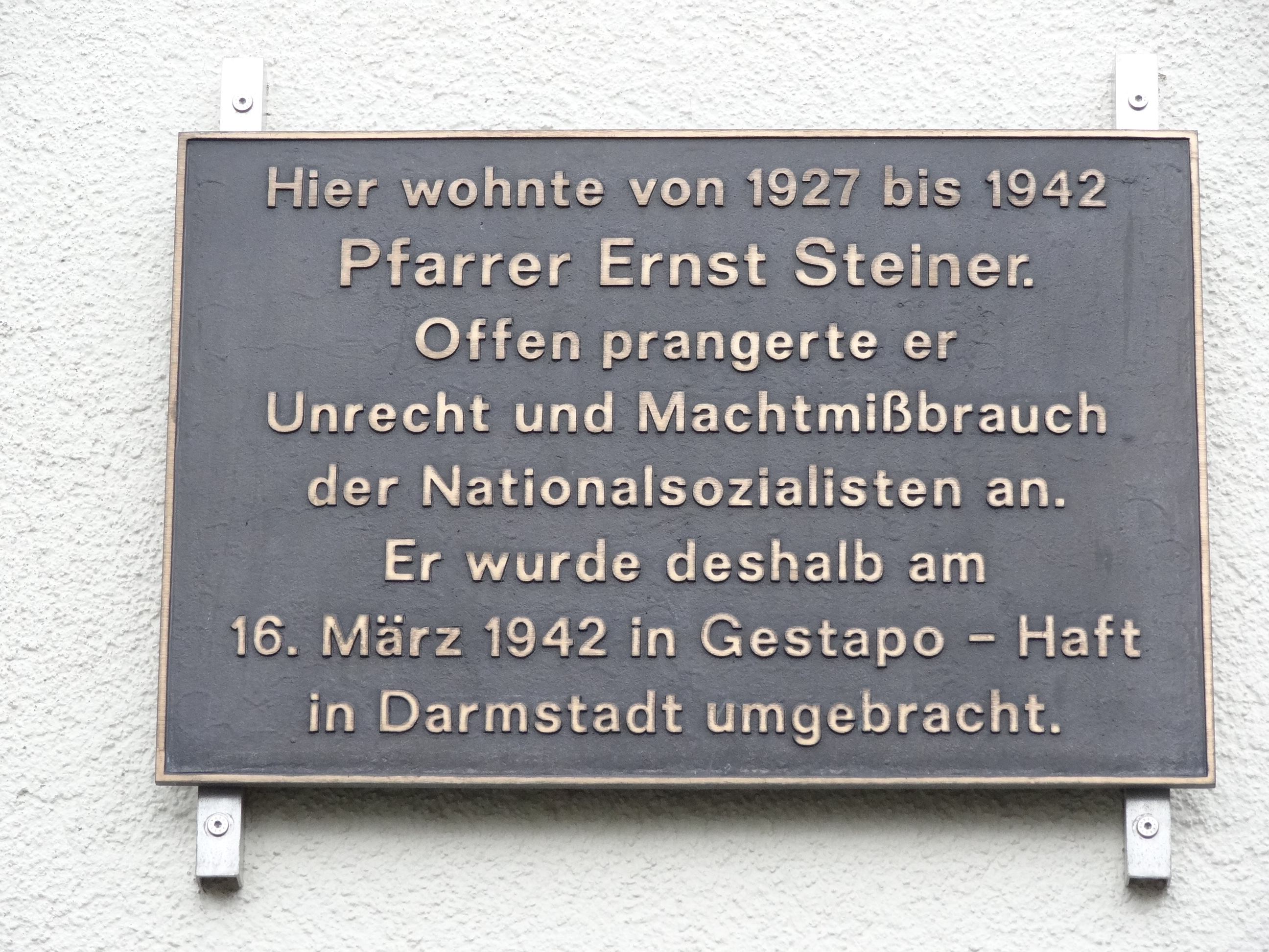 Ernst-Steiner-Straße 14 (Hausen)